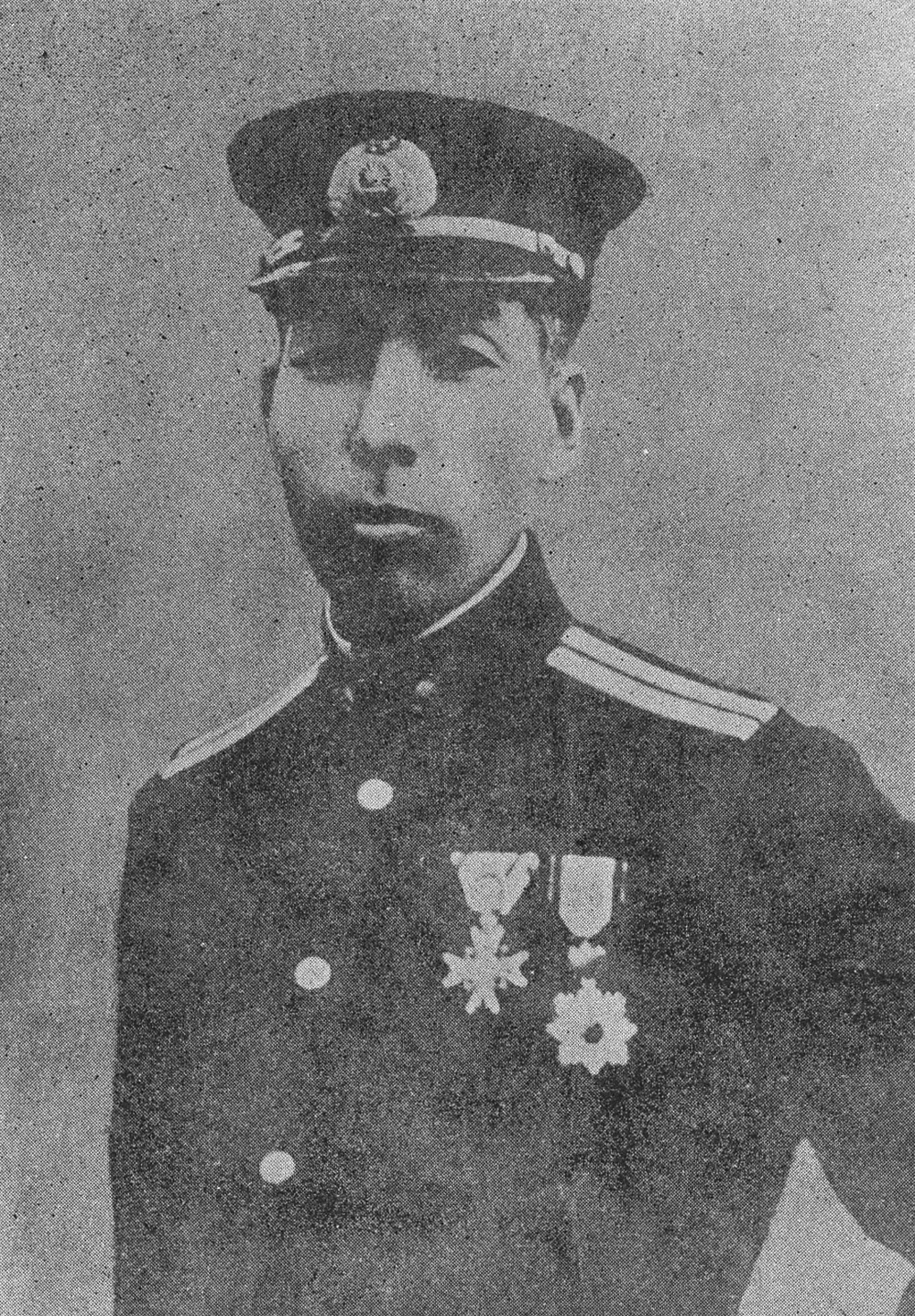 Portrait of Harada Masayoshi (原田真義, 1861 – 1912)